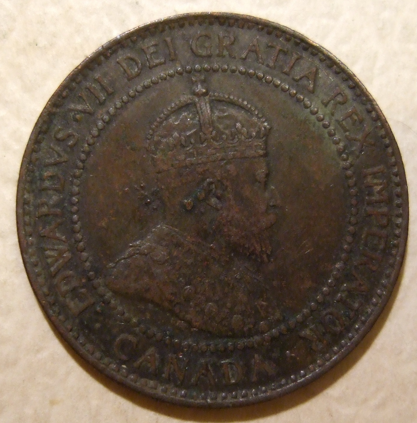 CANADA, EDWARD VII 1908 ---ONE CENT b